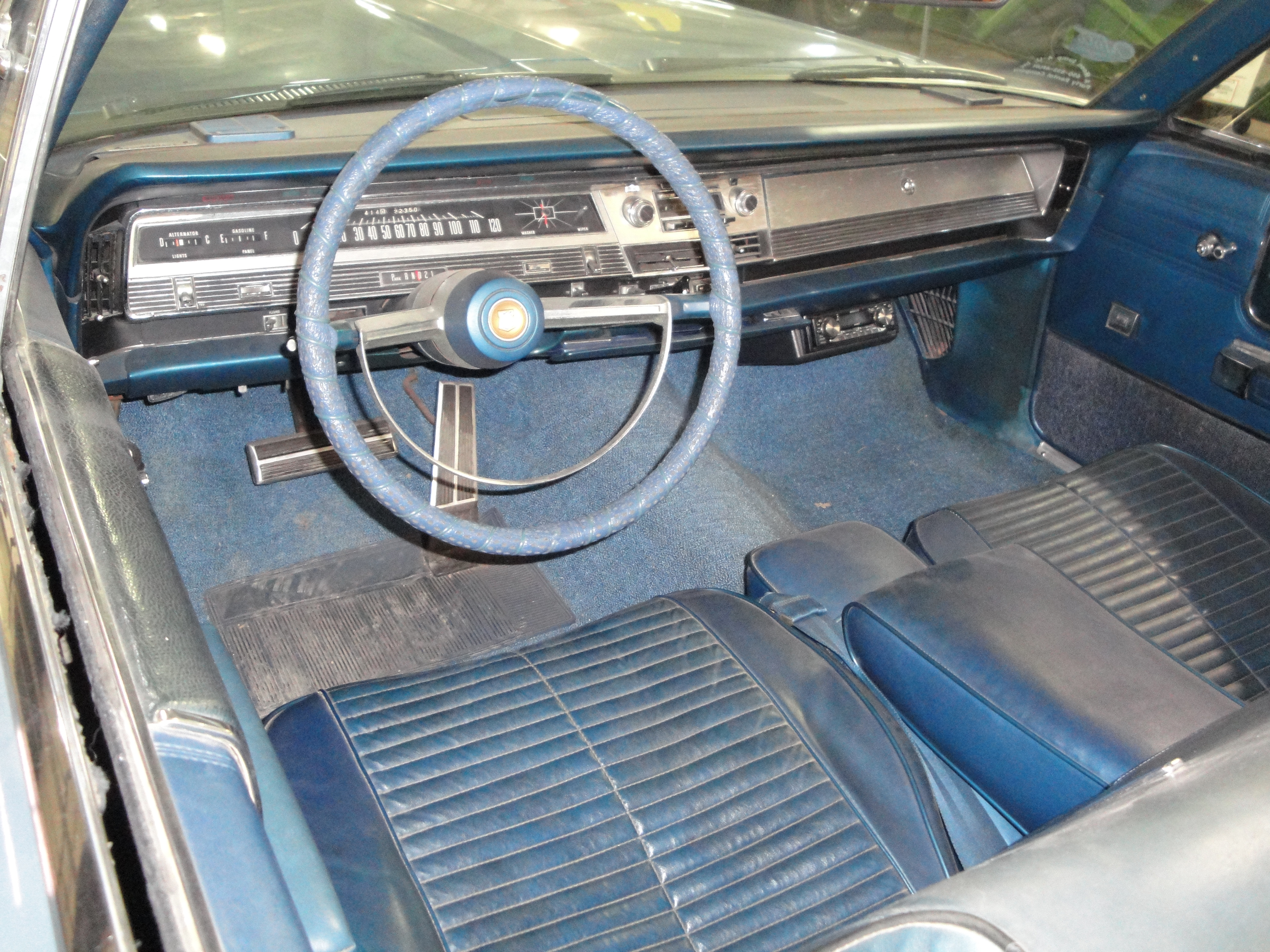 68 Chrysler 300